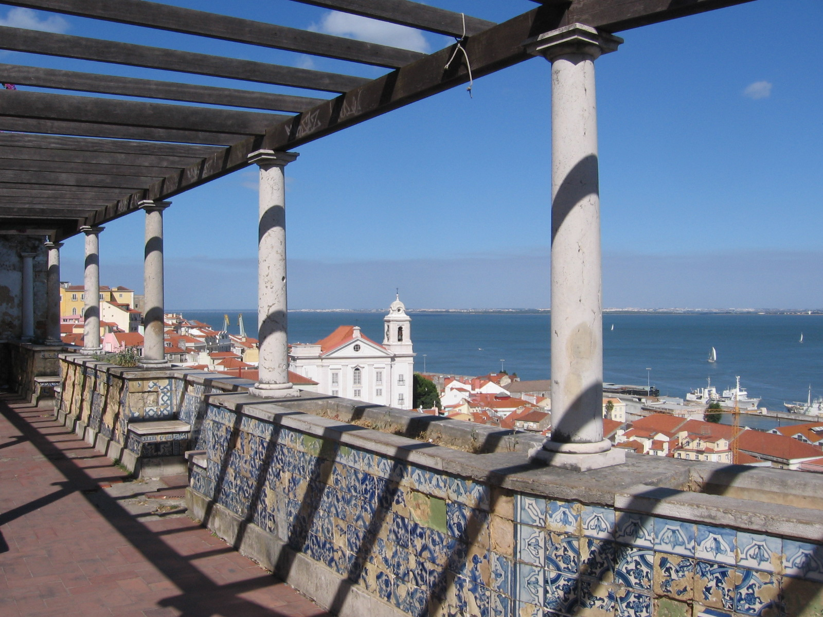 Miradouro de Santa Luzia, Alfama, Lisboa, Portugal